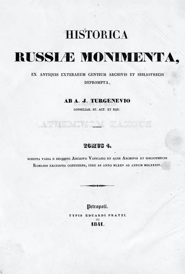 Historiae Russiae Monumenta ex antiquis exterarum gentium archivis et bibliothecis deprompta ab A. I. Turgenevio titulus